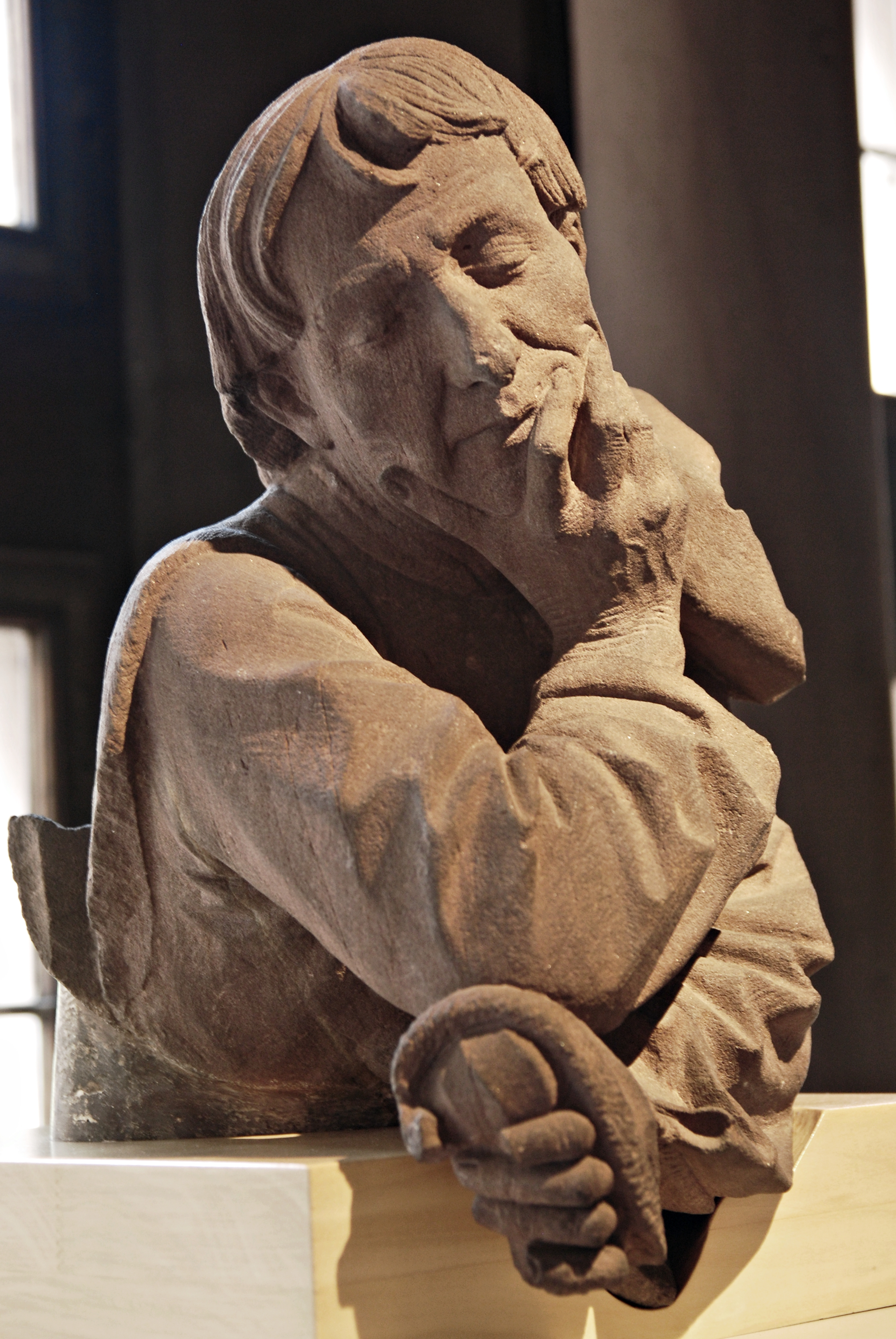 Self-portrait ?